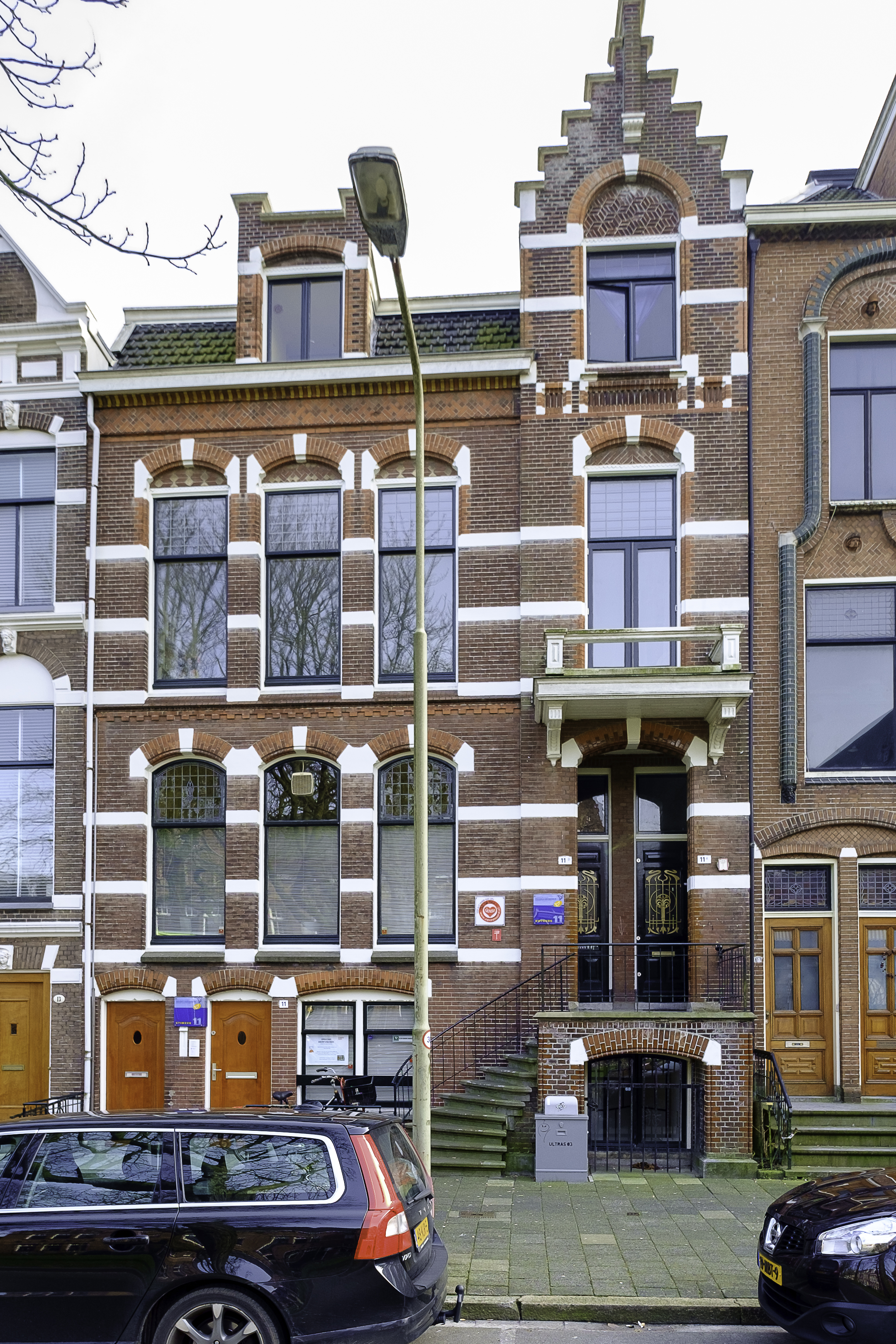 Radesingel 11-11a in de stad Groningen. In dit gebouw is het Centrum voor Seksuele Gezondheid Noord-Nederland gevestigd, dat bestaat uit Stichting Stimezo Groningen (abortuskliniek) en Stichting SGNN (voormalig Rutgershuis).